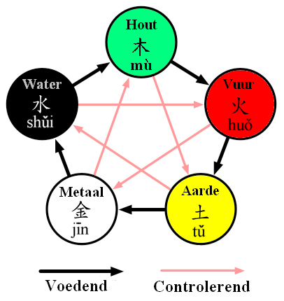 De voedende cyclus en de controlerende cyclus van het Vijf Fasen model, hier is de voedende cyclus van belang.